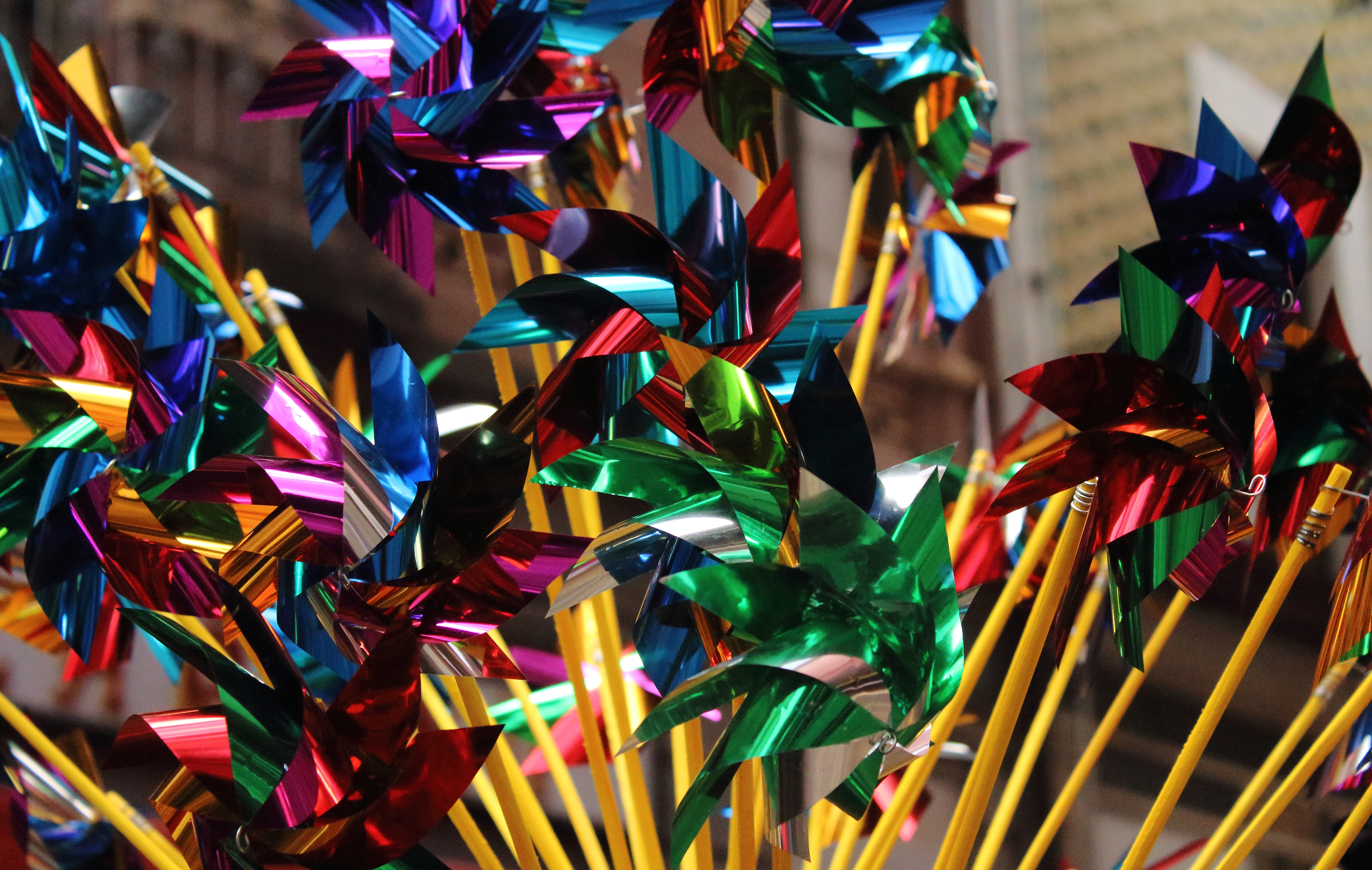 Molinillo o rehilete.